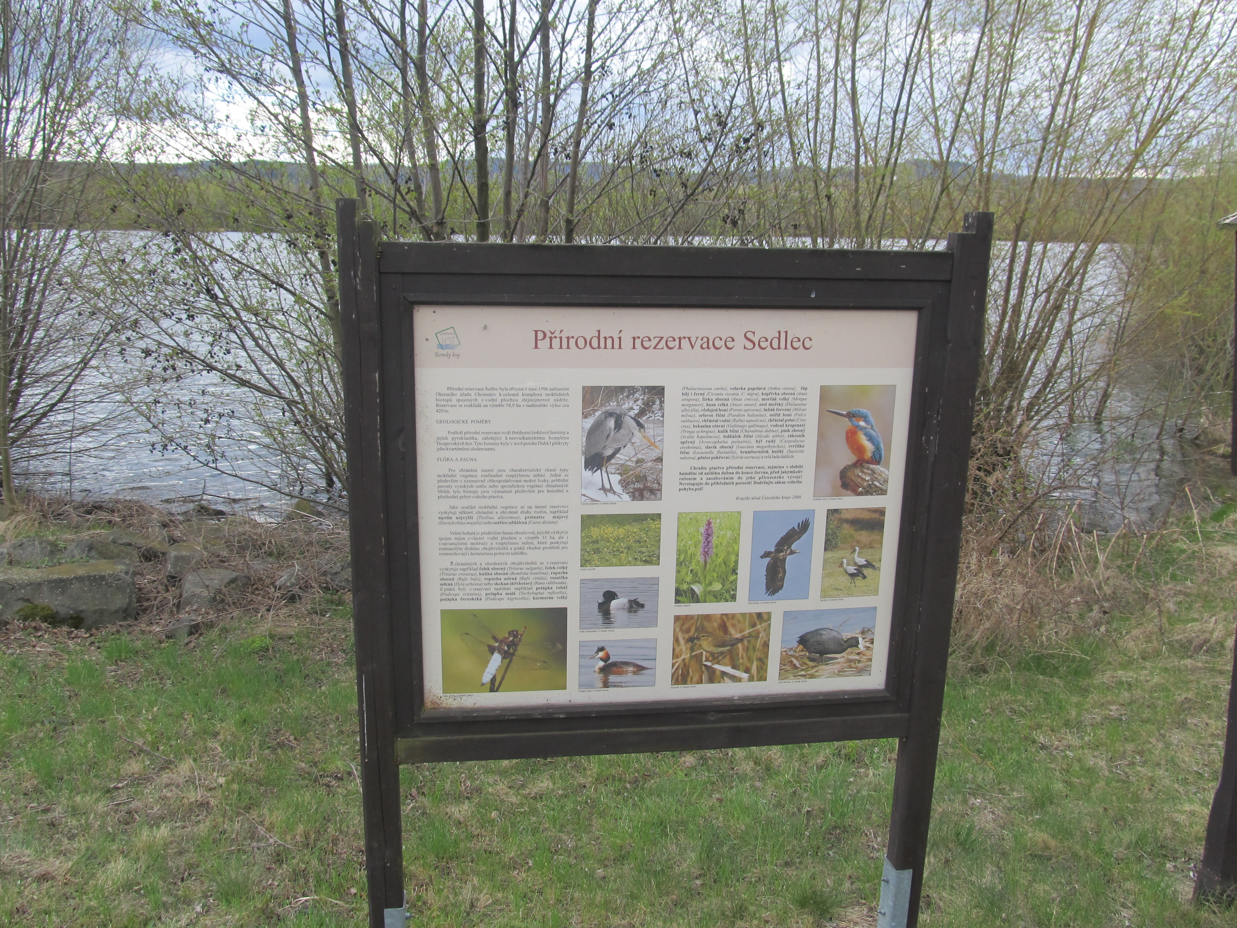 Přírodní rezervace Sedlec